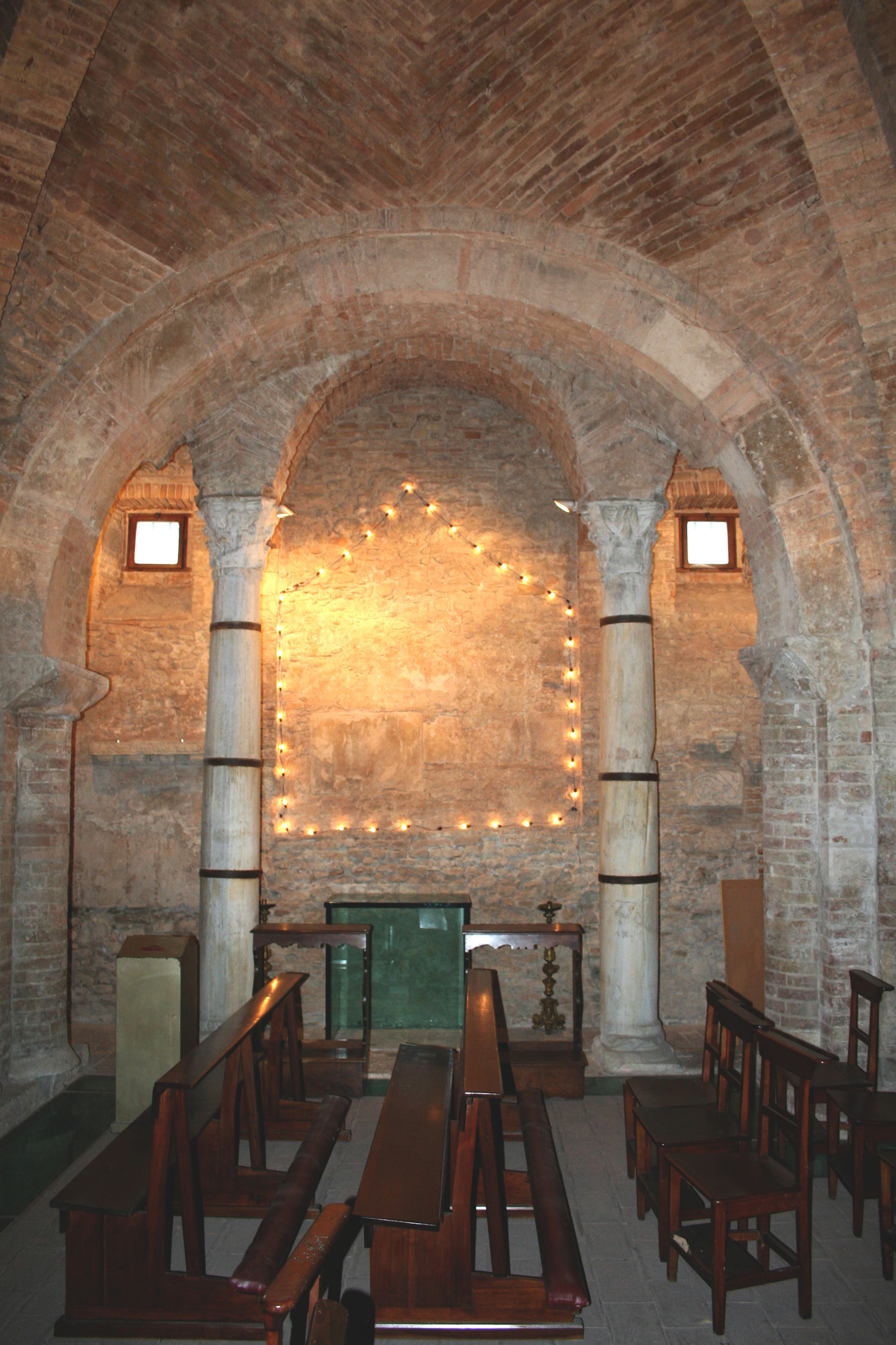 Chiesa di Sant'Anna dei Pompetti di Teramo, interno, nicchia occidentale. Un sentito ringraziamento a Don Paolo Di Mattia, parroco della chiesa di Sant’Antonio in Teramo, che ha consentito lo scatto di questa immagine.